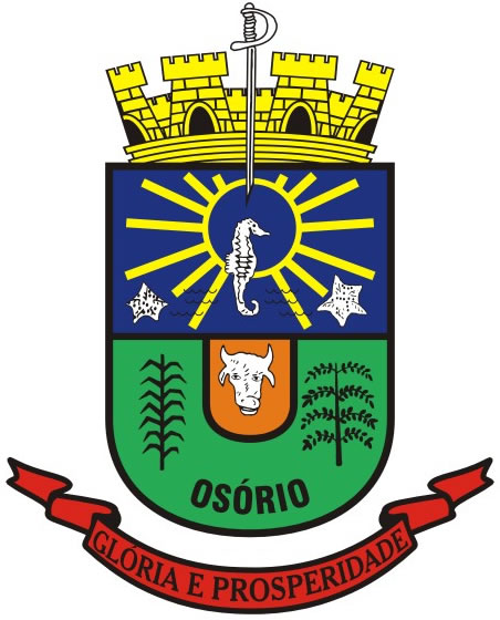 Brasão da cidade de Osório